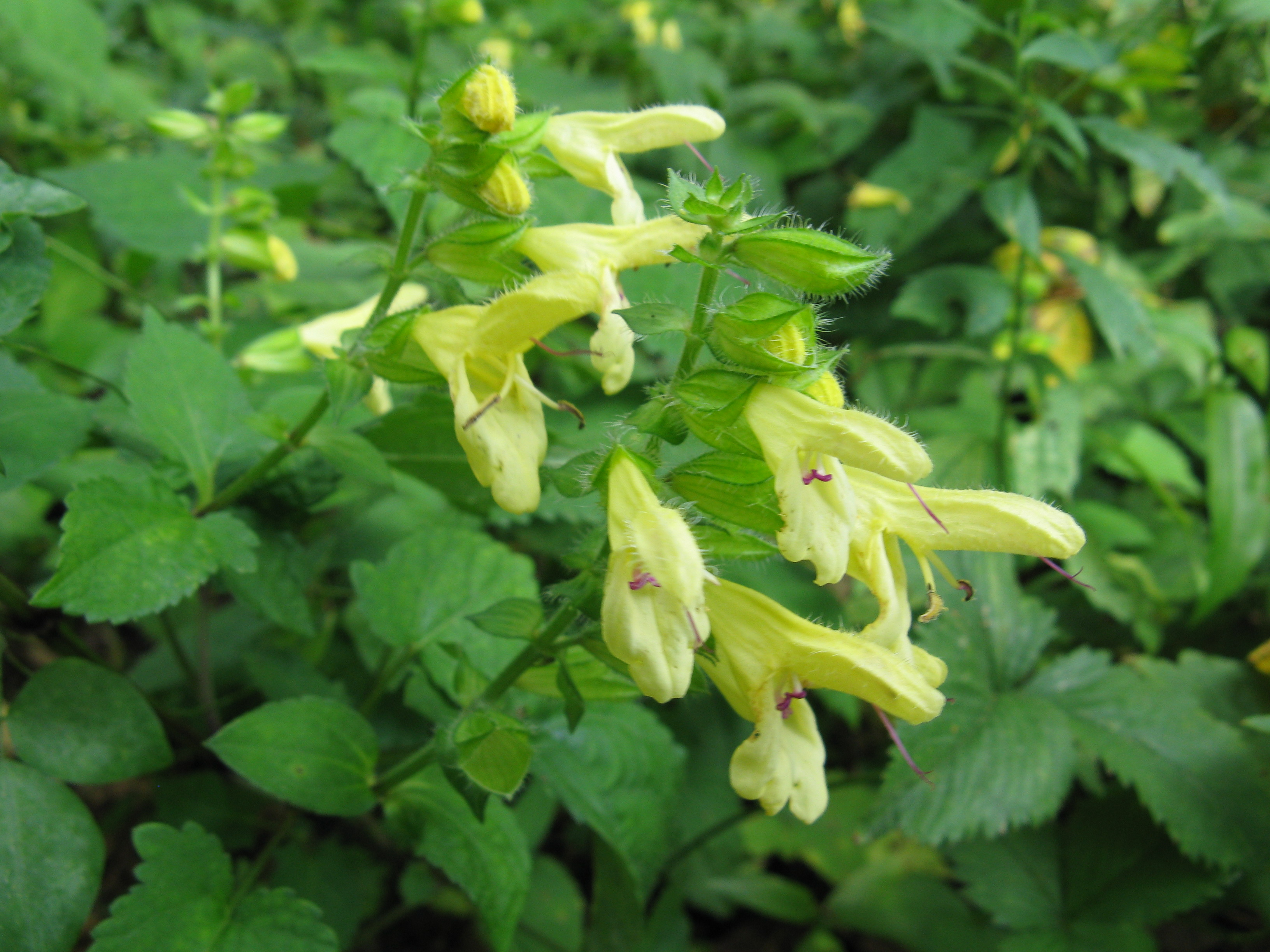 Scientific name Salvia nipponica